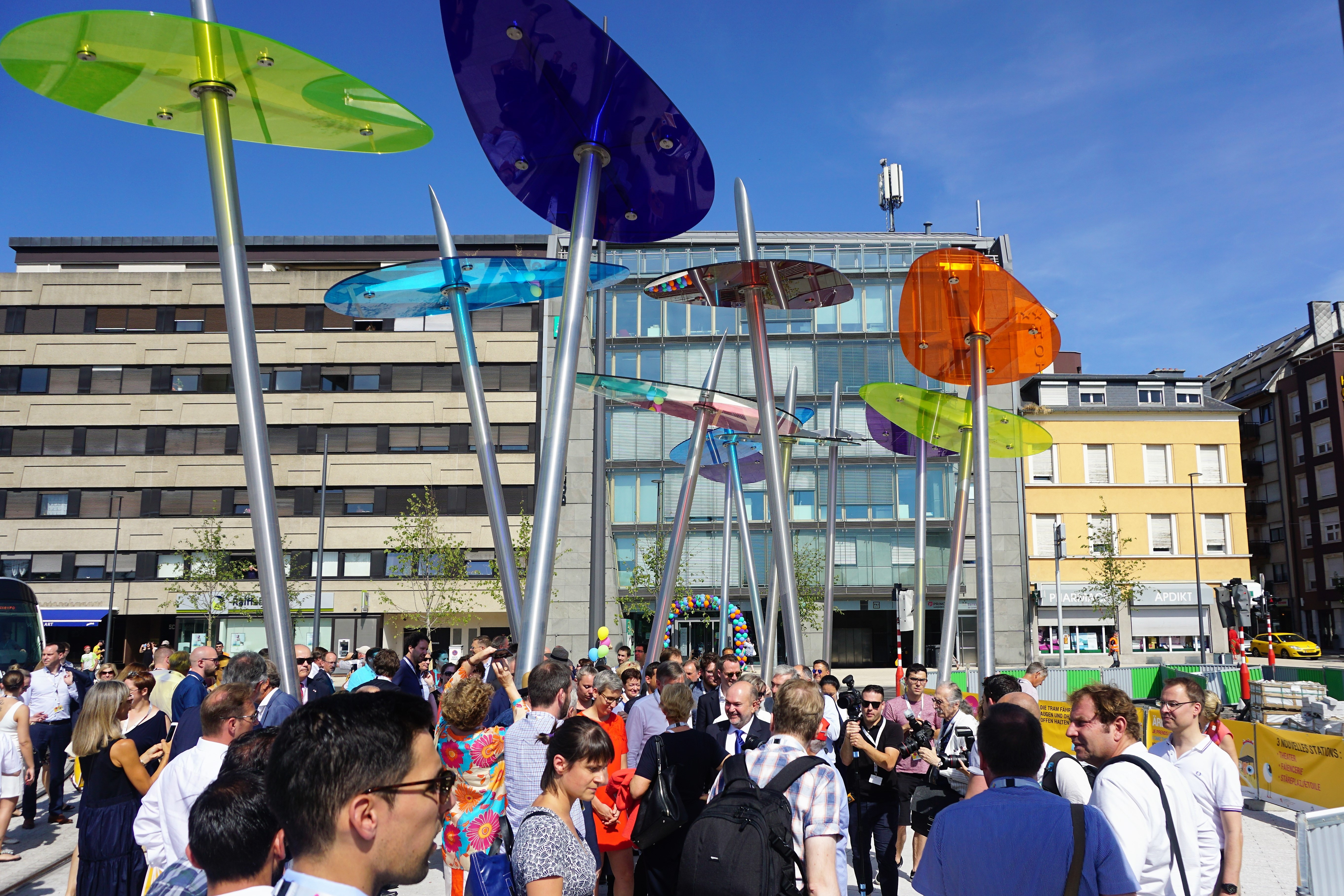 Inauguration de la 2e phase de la ligne de tramway à Luxembourg le 27 juillet 2018. Accueil du public à la station Theater.